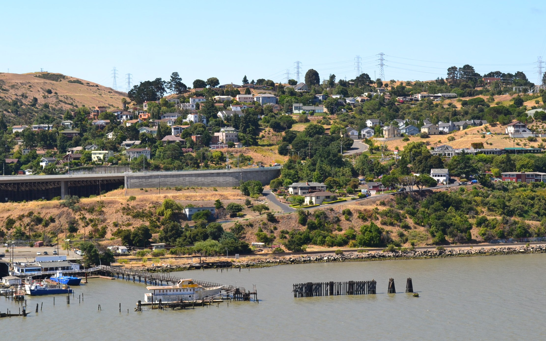 Crockett Hillside